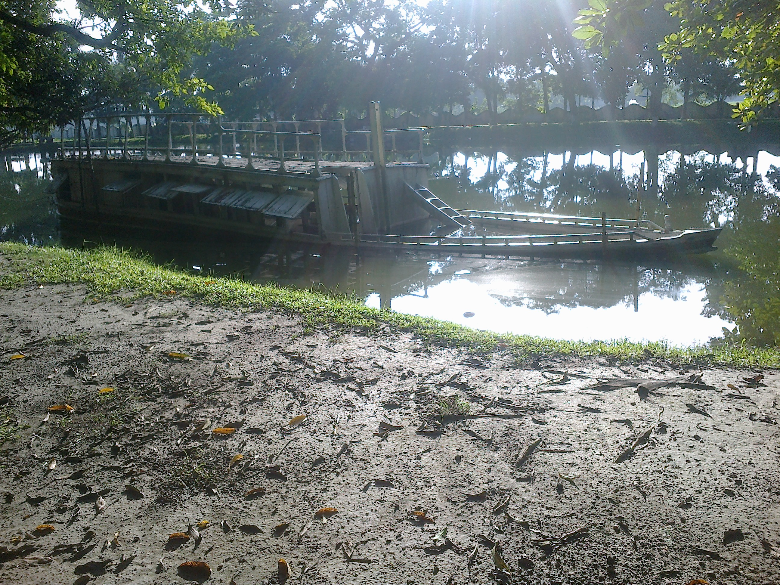 শিলাইদহ রবীন্দ্র কুঠিবাড়ি